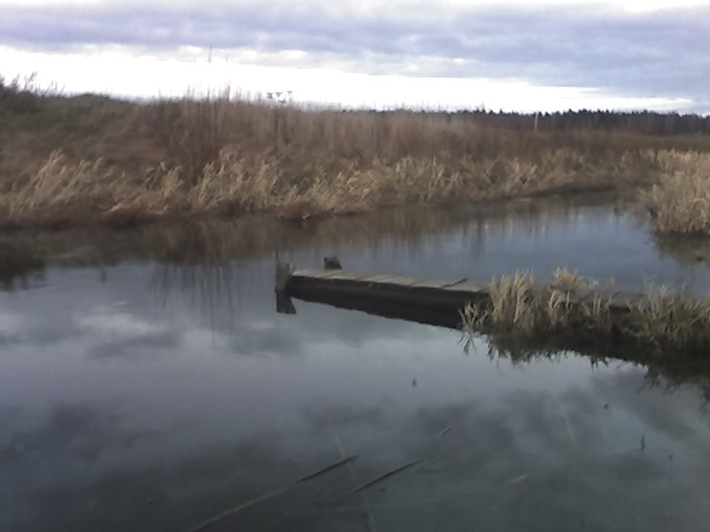 Juosta Jacgalyje, Anykščių raj.